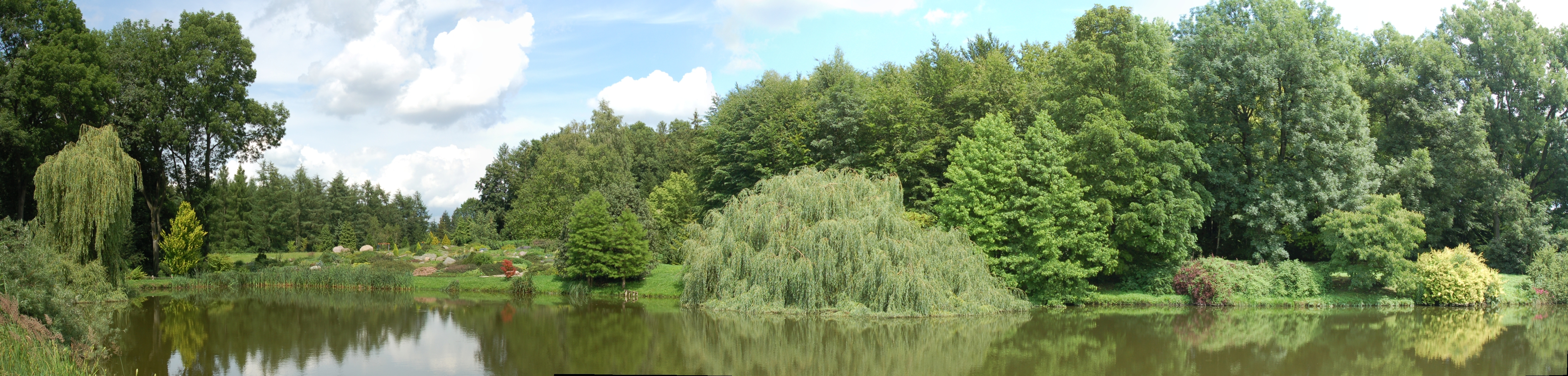 Widok na Staw Centralny